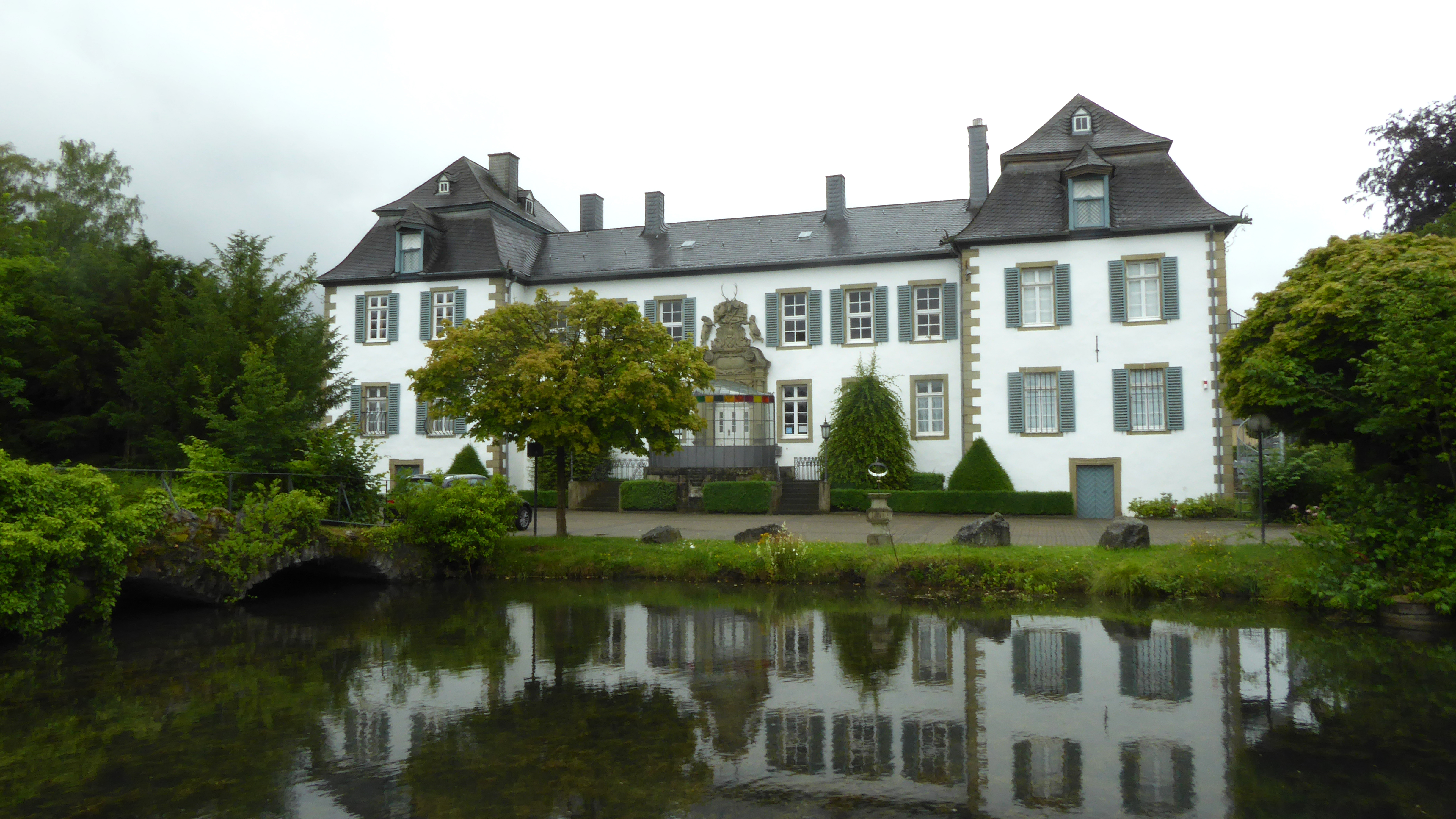 Haus Kupferhammer mit Teichanlage und Innenhof.